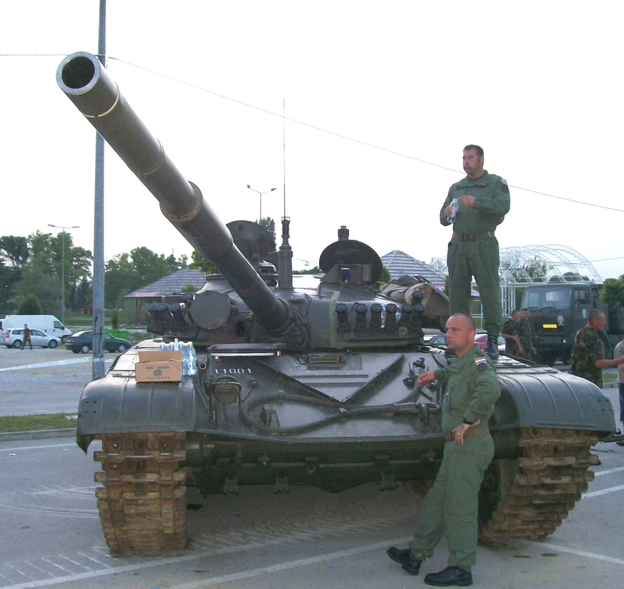 Tenk M-84